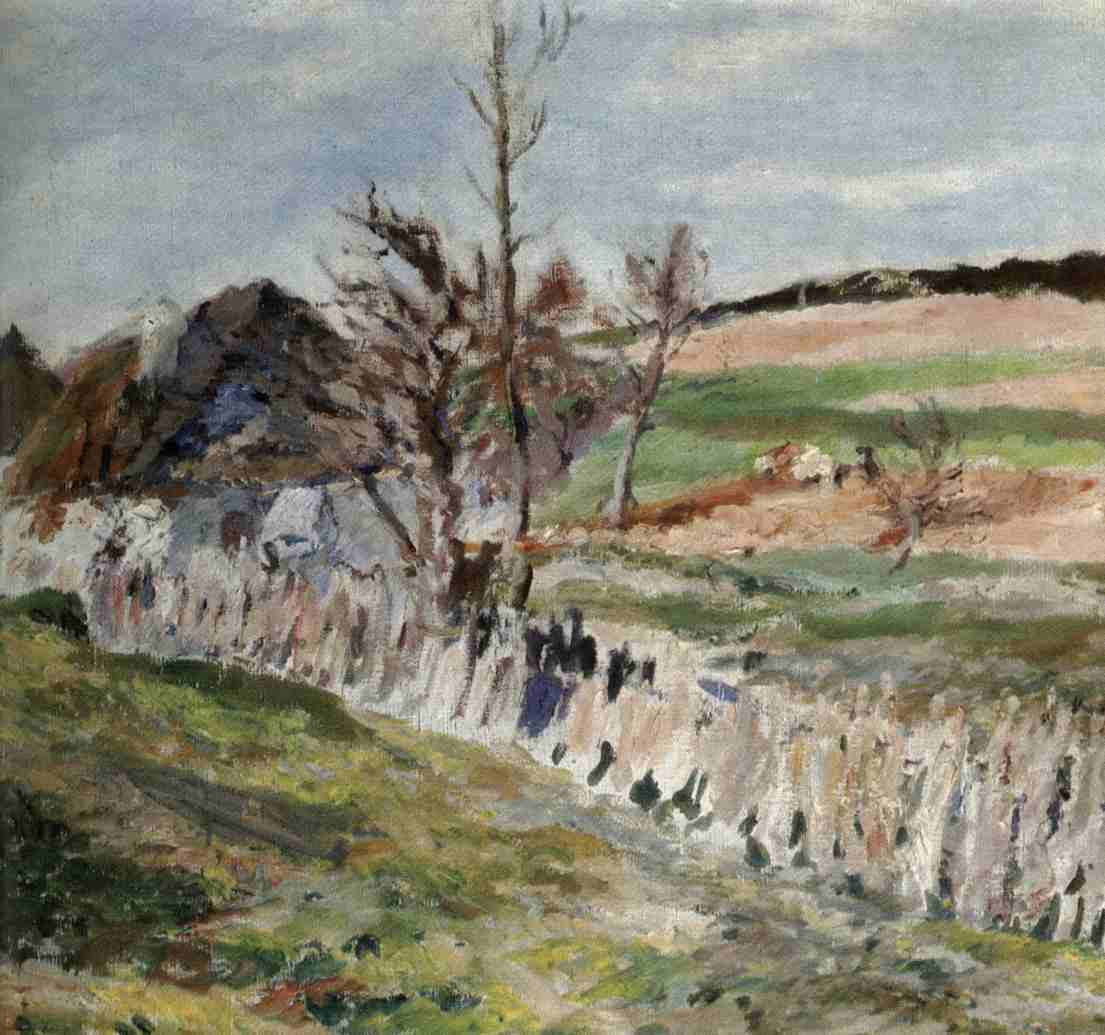 Suchý den (1913)